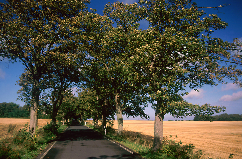 Allee auf Rügen